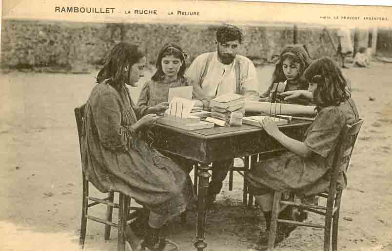 La Ruche est une école libertaire et un espace de vie communautaire fonctionnant selon le concept de coopérative intégrale. Fondée en 1904, à Rambouillet (Yvelines), par Sébastien Faure, elle disparait durant l'hiver 1917 suite aux restrictions imposée par la Première Guerre mondiale.